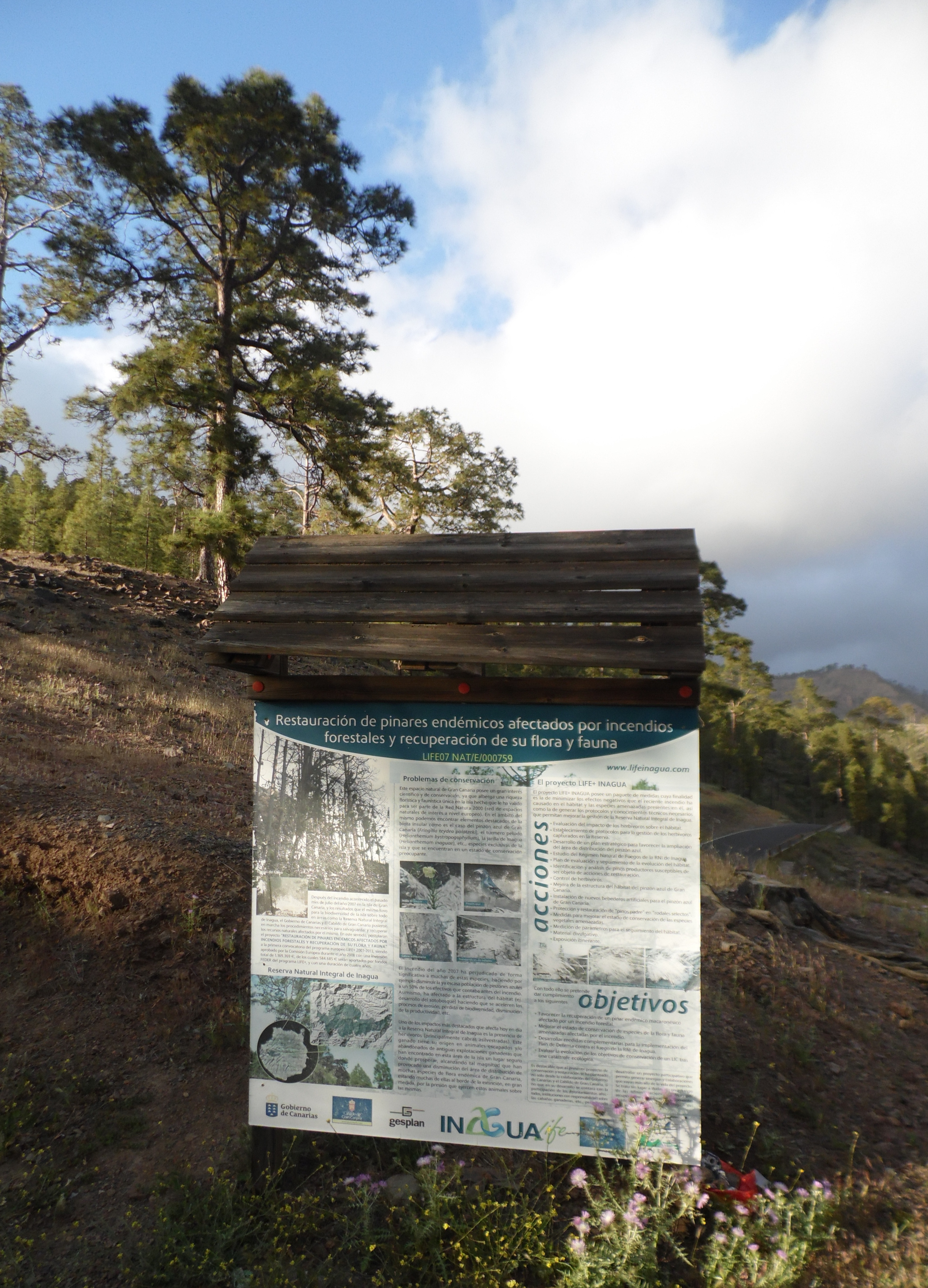 Reserva Natural Integral de Inagua